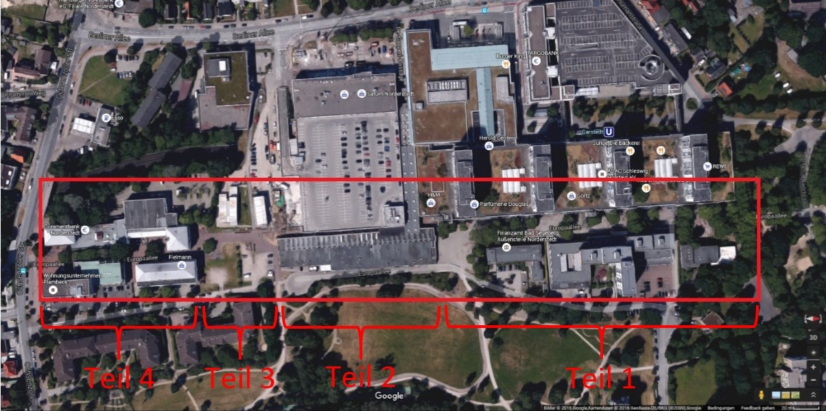 Satellitenbild der Fußgängerzone Europa-Allee in Norderstedt mit vier Teilbereichen